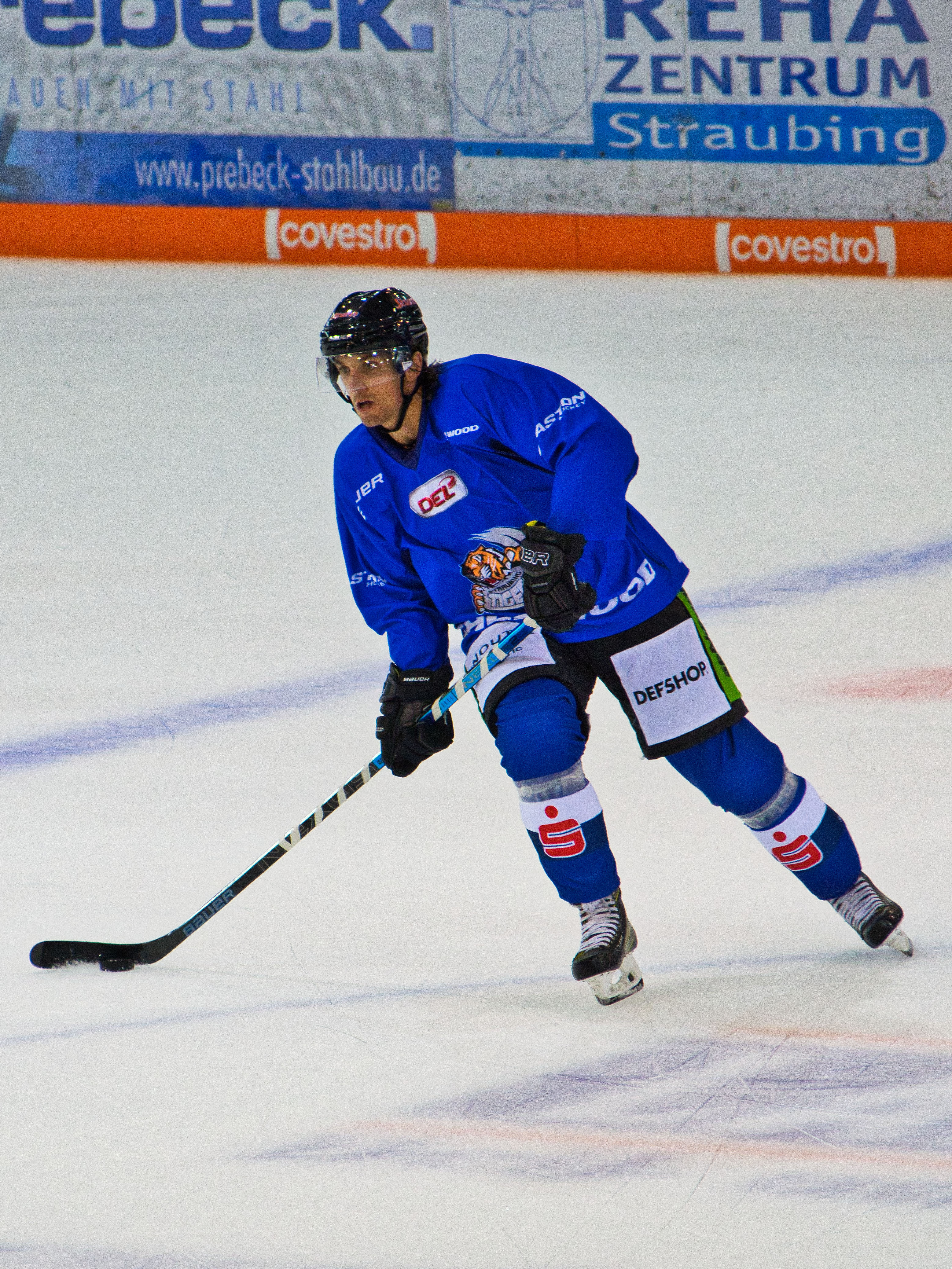 Jeremy Williams beim öffentlichen Training der Straubing Tigers am 4. August 2018.